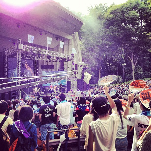 閃光ライオット2012ファイナルの開催模様。